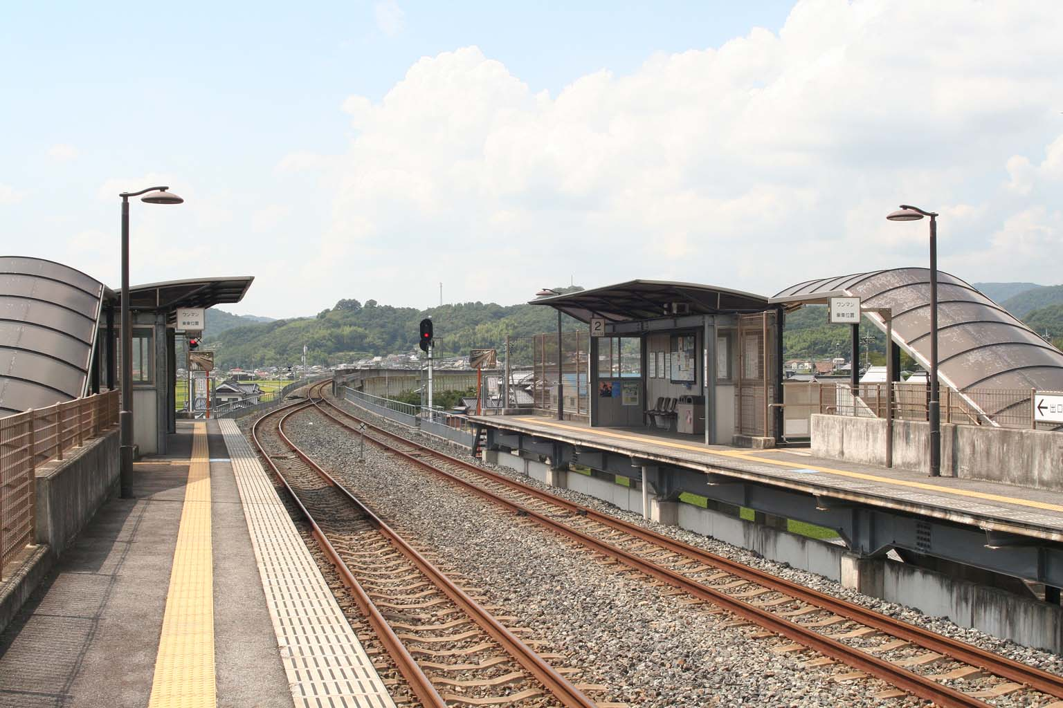 三谷駅の構内